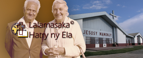 Malagasy: MA Daoud wikipedia